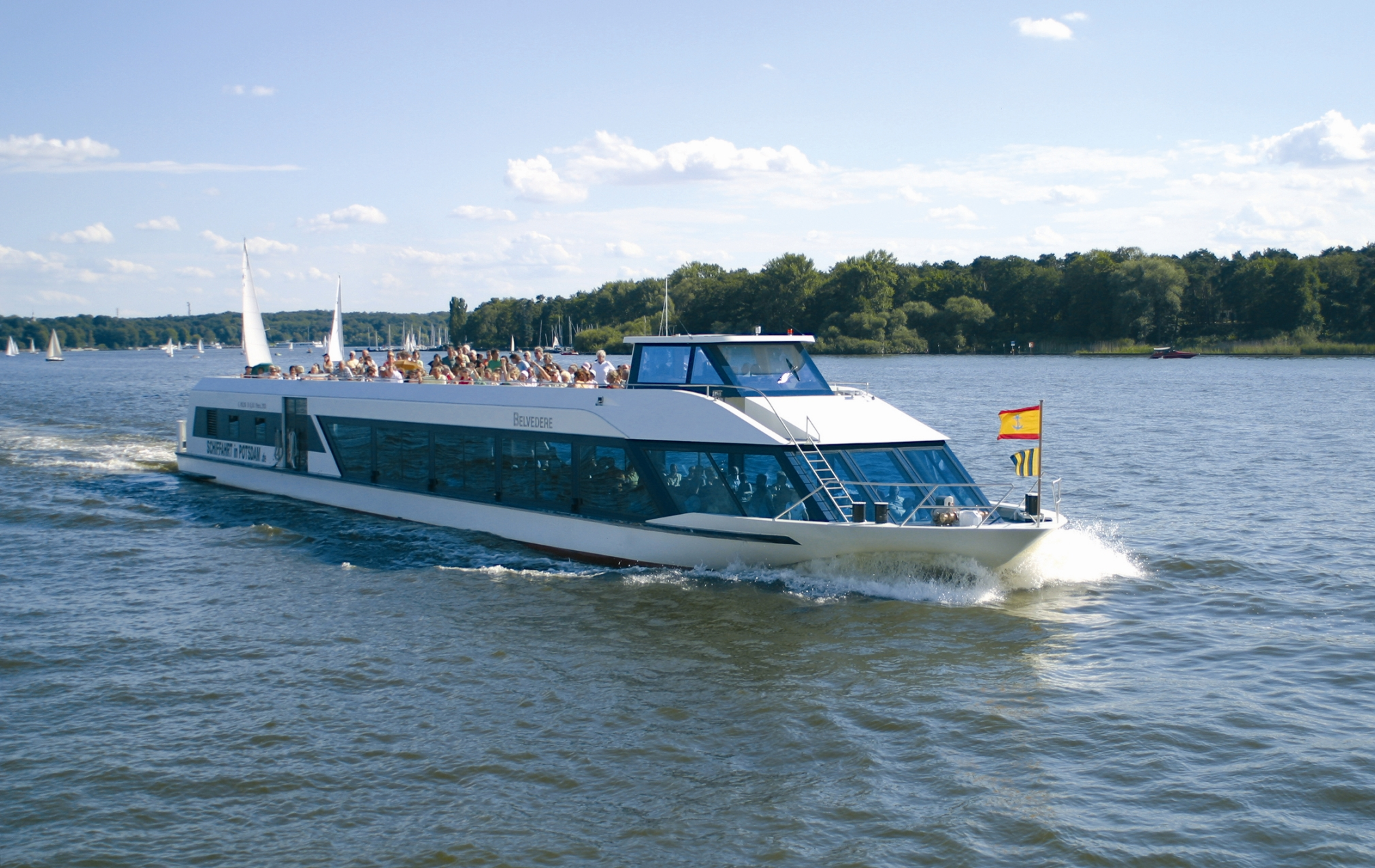 Fahrgastschiff